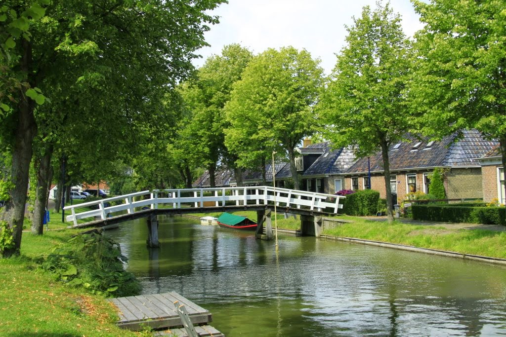 Het mooie dorp Achlum bezit maar liefst 29 Rijksmonumenten, Het telt in 2017 ongeveer 650 inwoners.